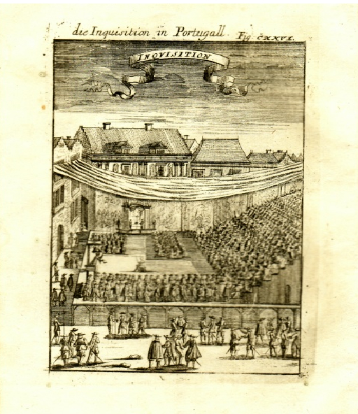 "Die Inquisition in Portugall" - Original Miniature Copper Engraving from the book: "Description de L'Univers, Contenant les Différents Systèmes de Monde, Les Cartes Générales & Particulières de la Géographie Ancienne & Moderne."